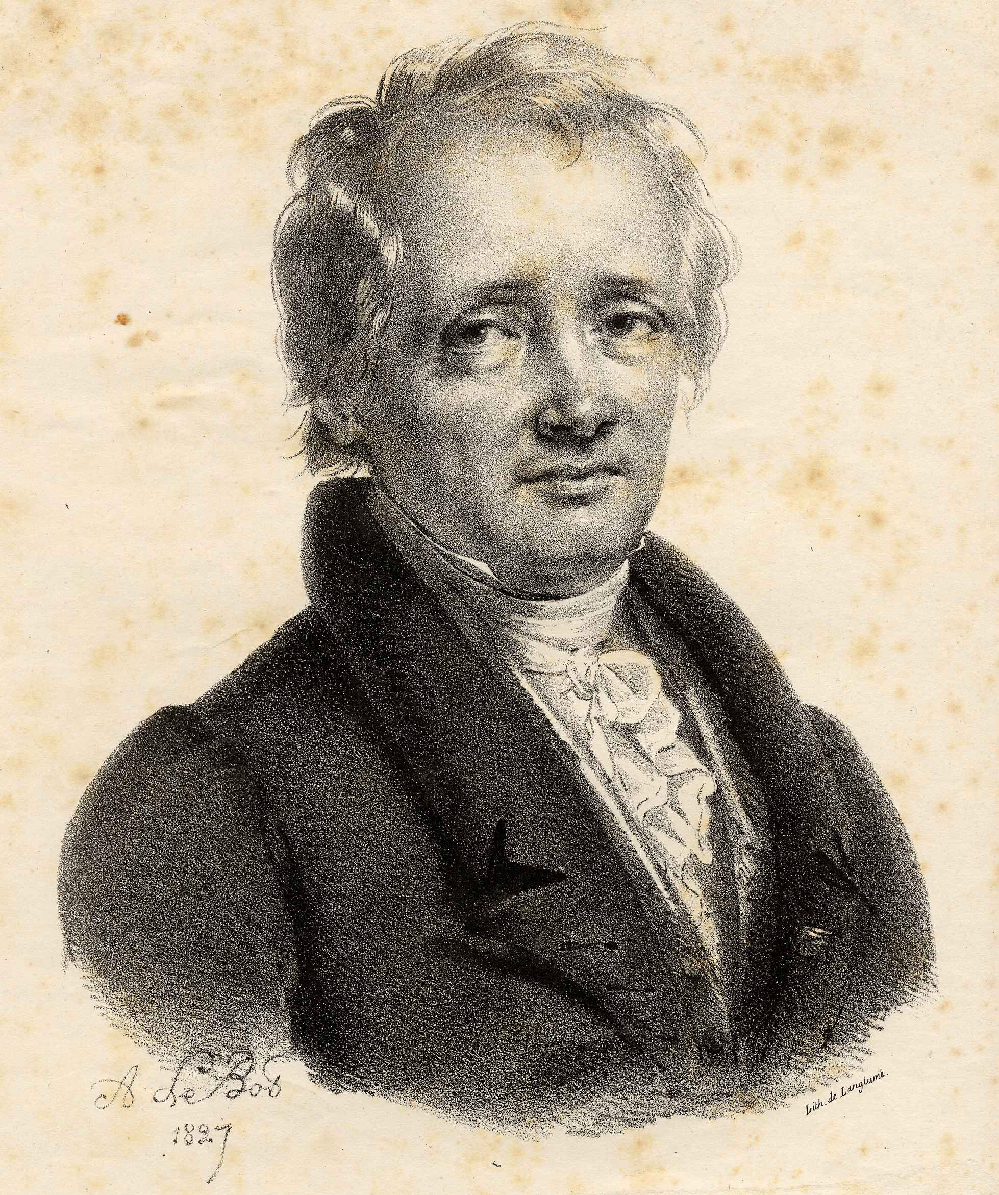 Marc-Antoine Jullien de Paris en 1827. Gravure, 29,8 x 19,1 cm.